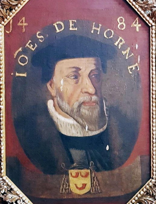 Portret van Johan van Horne, prins-bisschop van Luik (1484-1505).